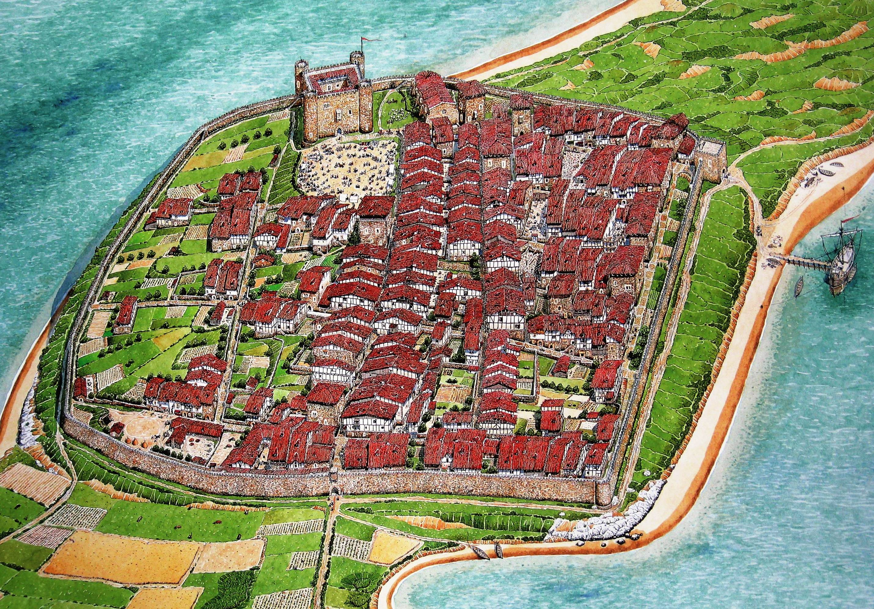 Karte von Hondarribia, Infotafel auf dem Marktplatz